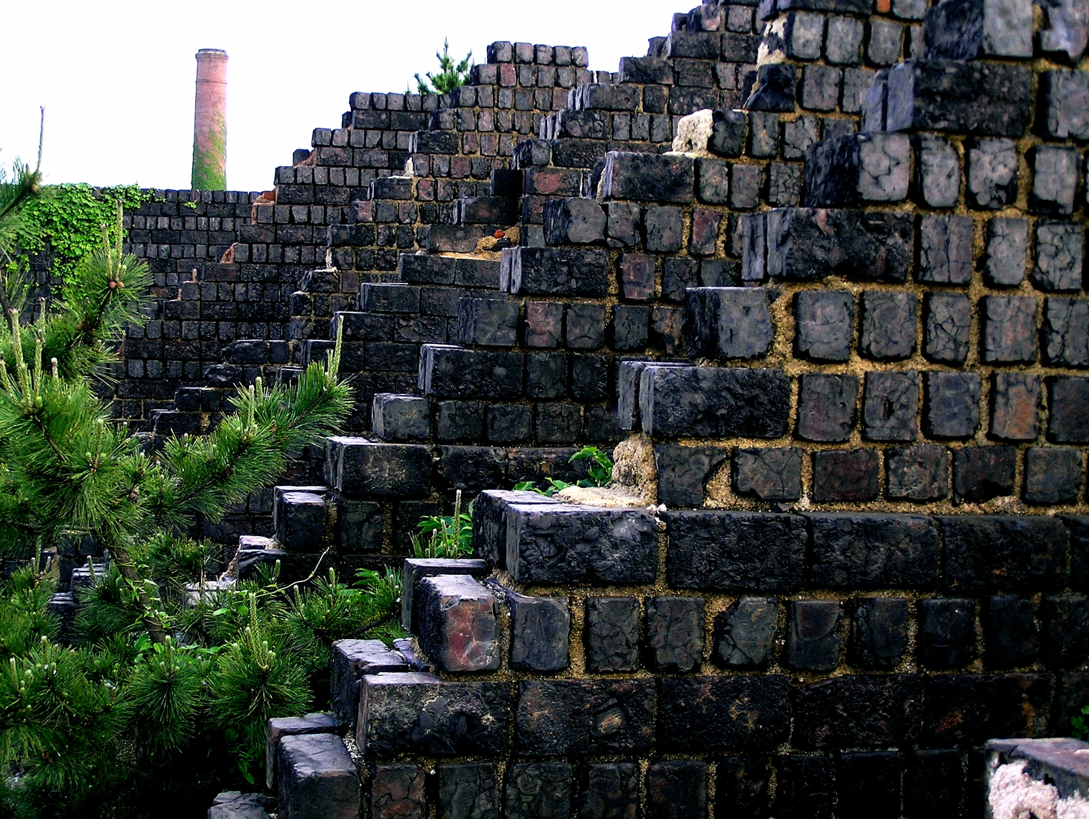 2004-05-22 Inujima,犬島